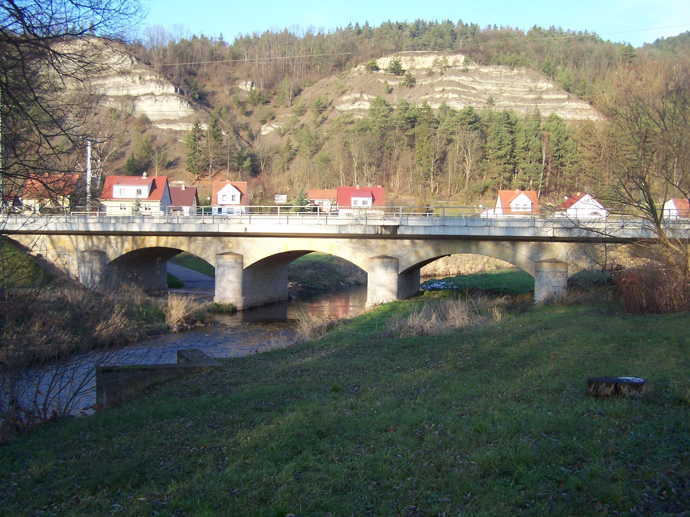 Die Eisenbahnbrücke über die Hörsel in Wutha-Farnroda.